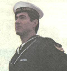 PNA Cabo 1ro Ibañez